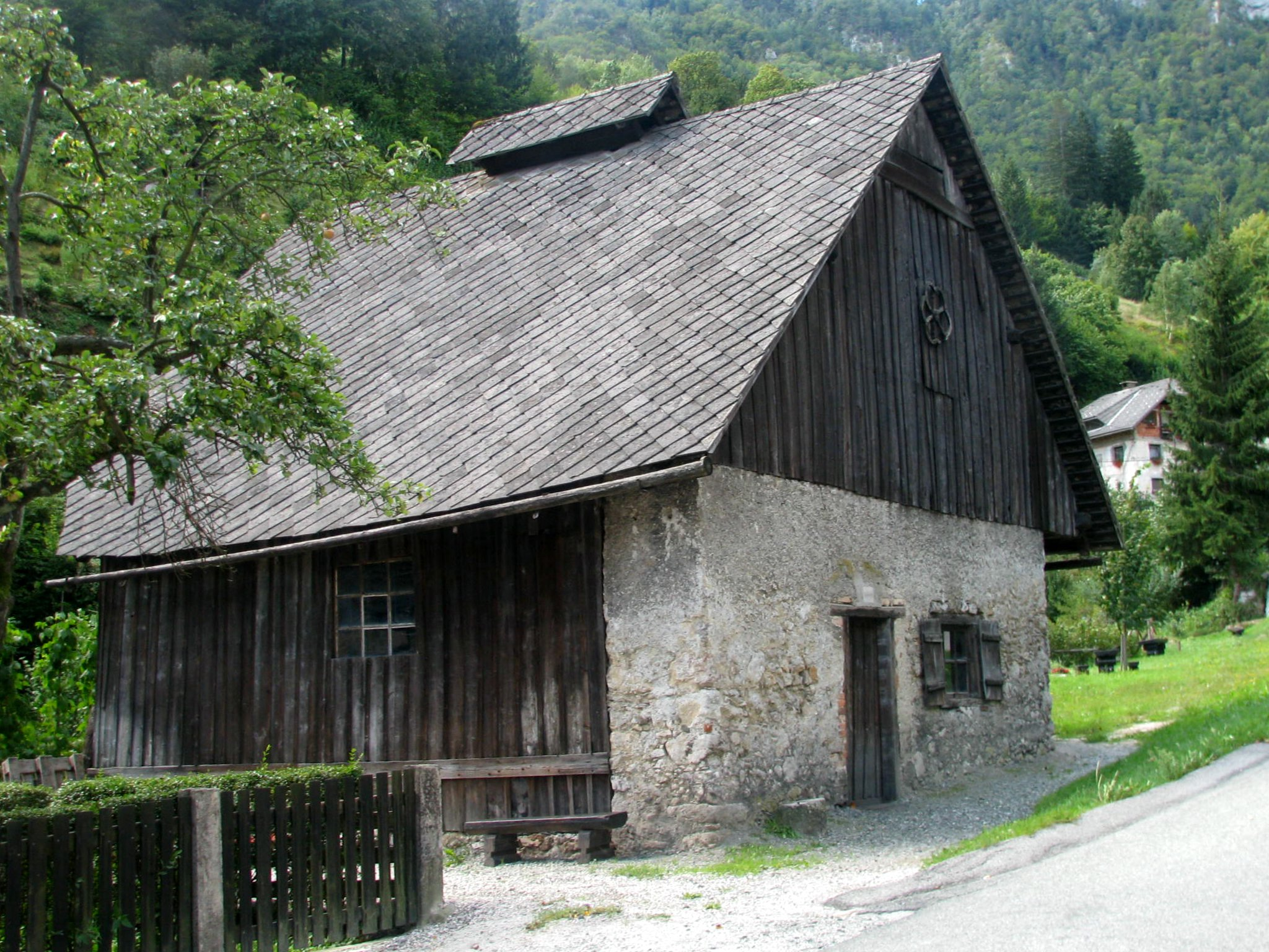 Vigenjc Vice